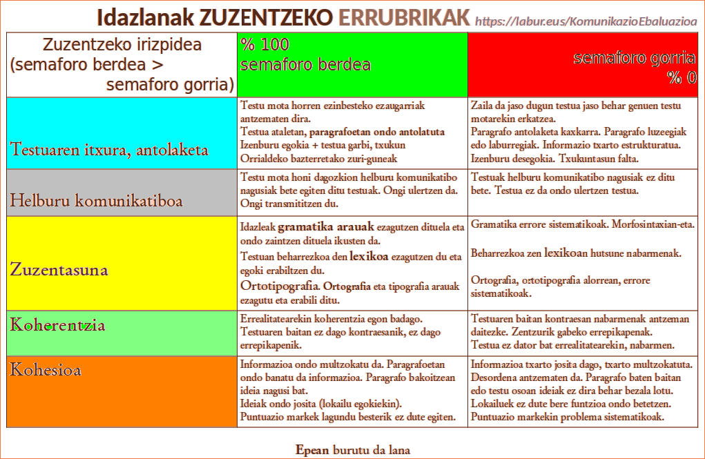 Testu idatziak zuzentzeko txantiloi bat. (Uribe Kosta BHIn sortutako eta erabilitako txantiloi baten gainean eraikitako txantiloia).